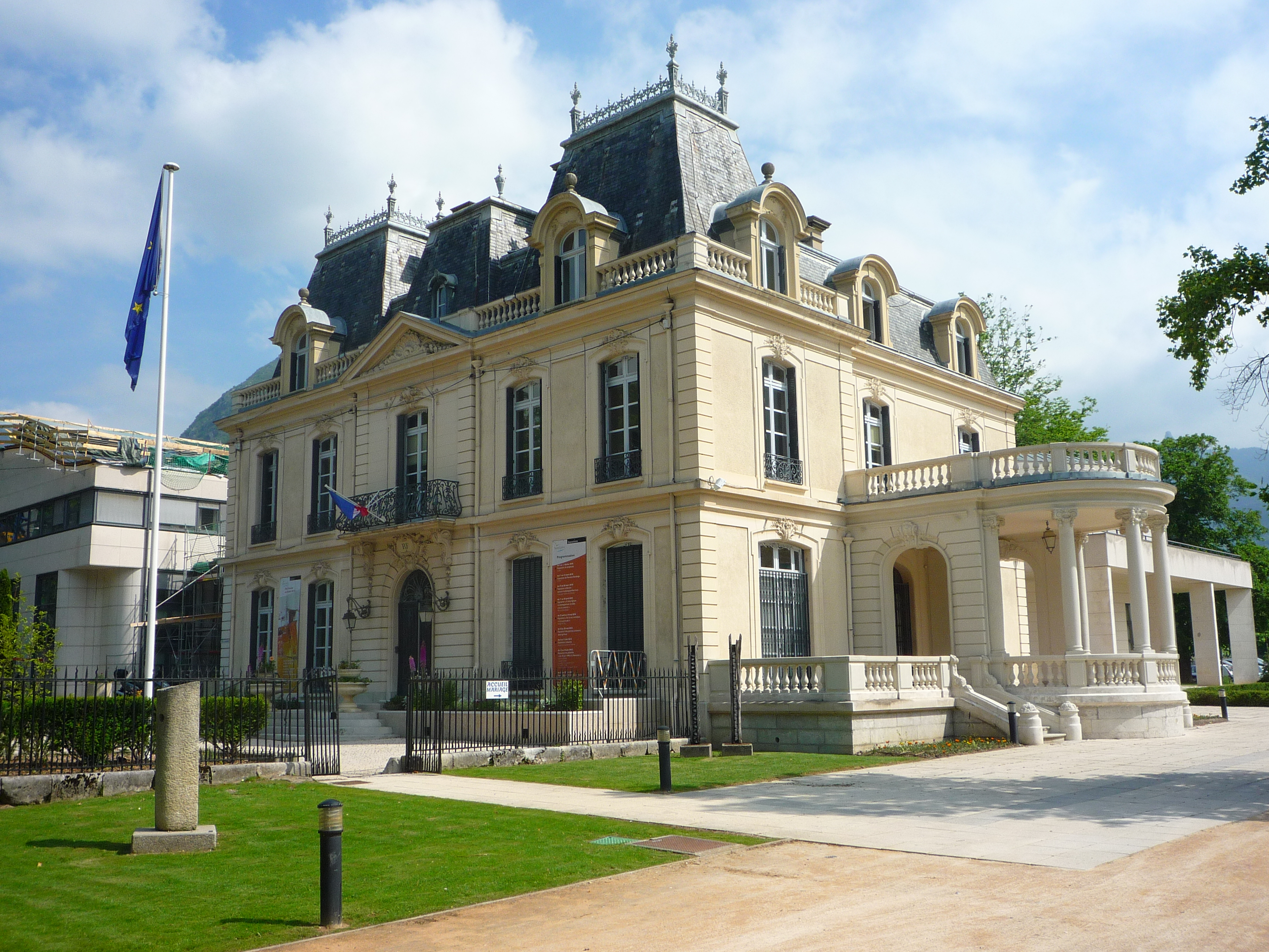 Mairie de Saint Égrève (Isère)